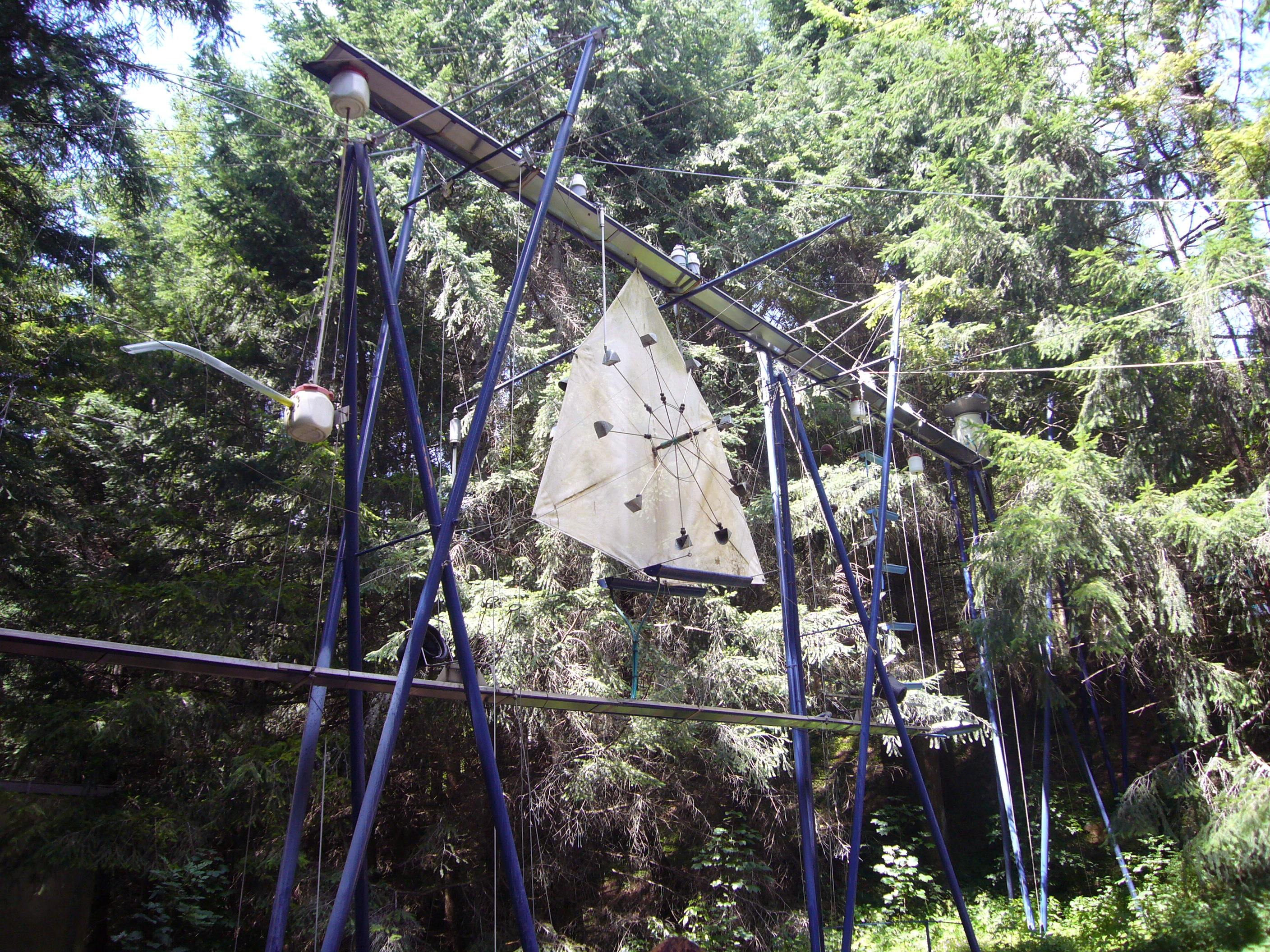 Oeuvre "Le Pays de l'eau" de Jean-Pierre Delettre (vallon du Villaret, Bagnols-les-Bains, Lozère, France)